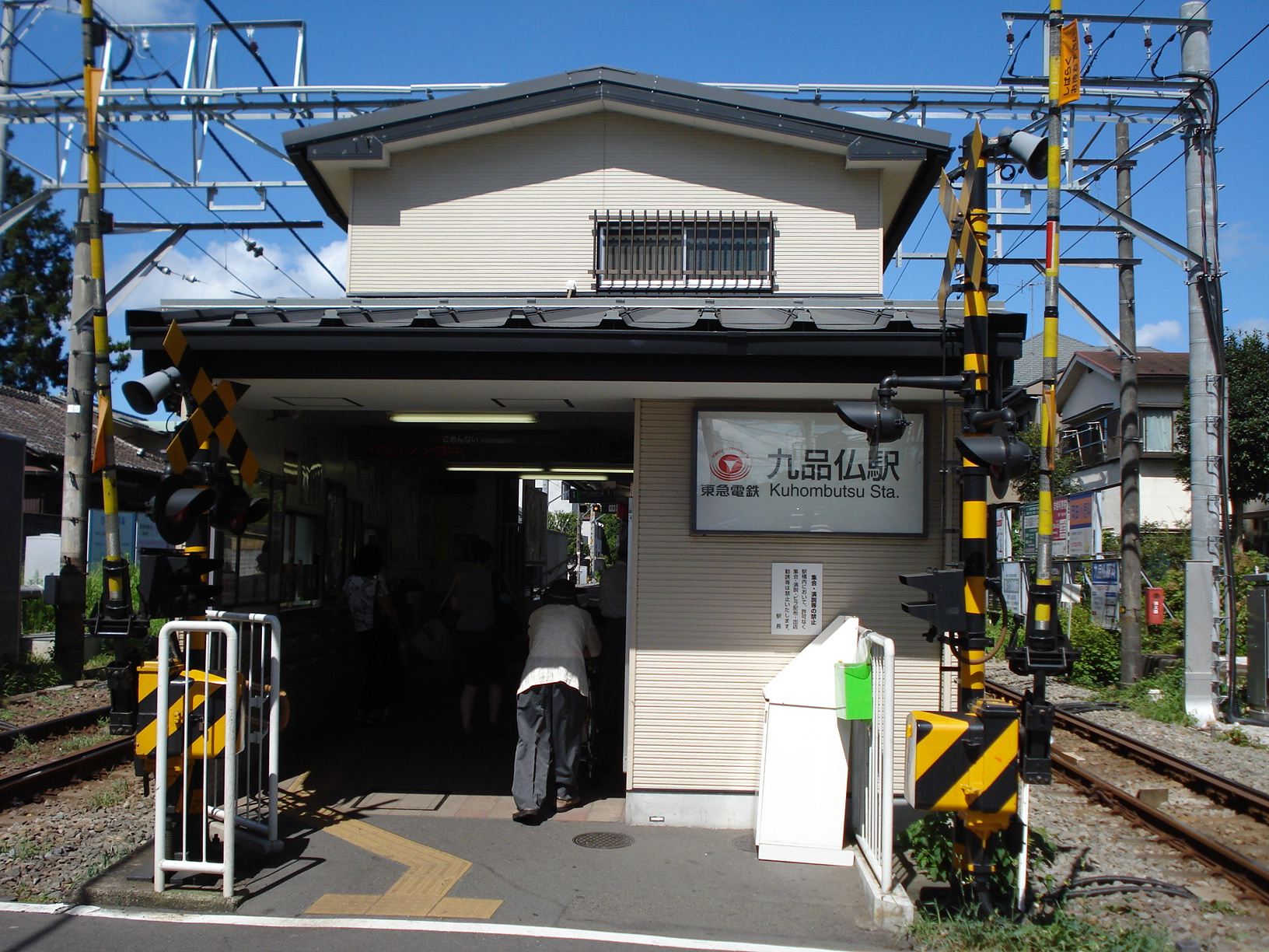 東京急行電鉄大井町線九品仏駅駅舎 2007年8月14日撮影 撮影者 Kiku-zou